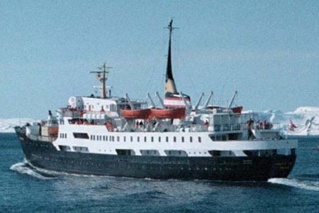 Hurtigruten. MS "Harald Jarl", built 1960.